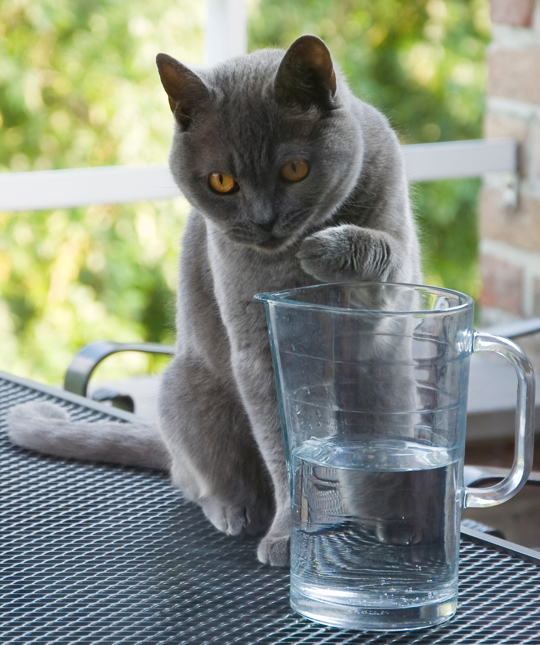 Whizzy - onze Brits korthaar